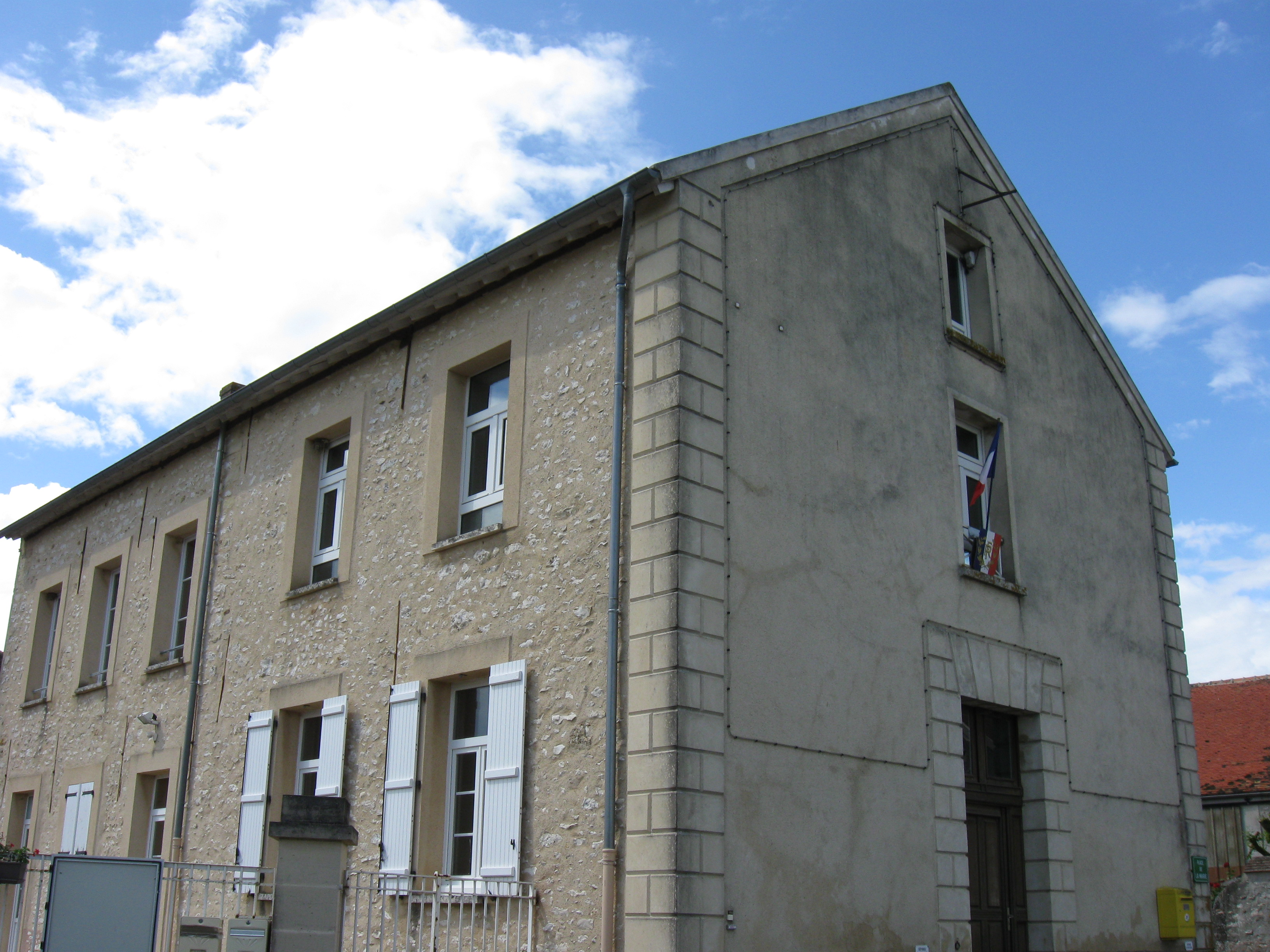 Mairie de Bezalles. (Seine-et-Marne, région Île-de-France).